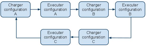 RTR globale